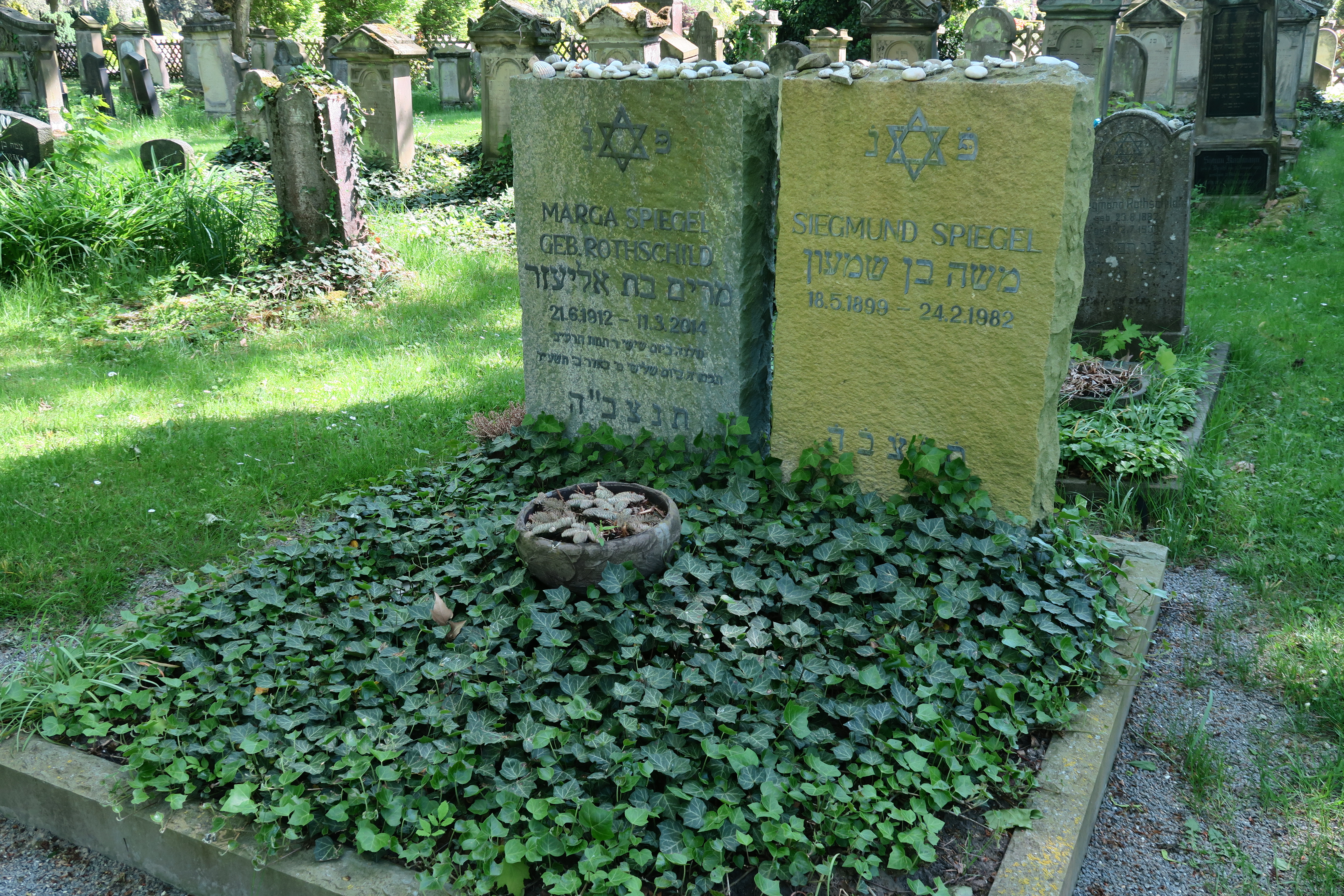 Jüdischer Friedhof in Ahlen; Grabstätte von Marga und Siegmund Spiegel